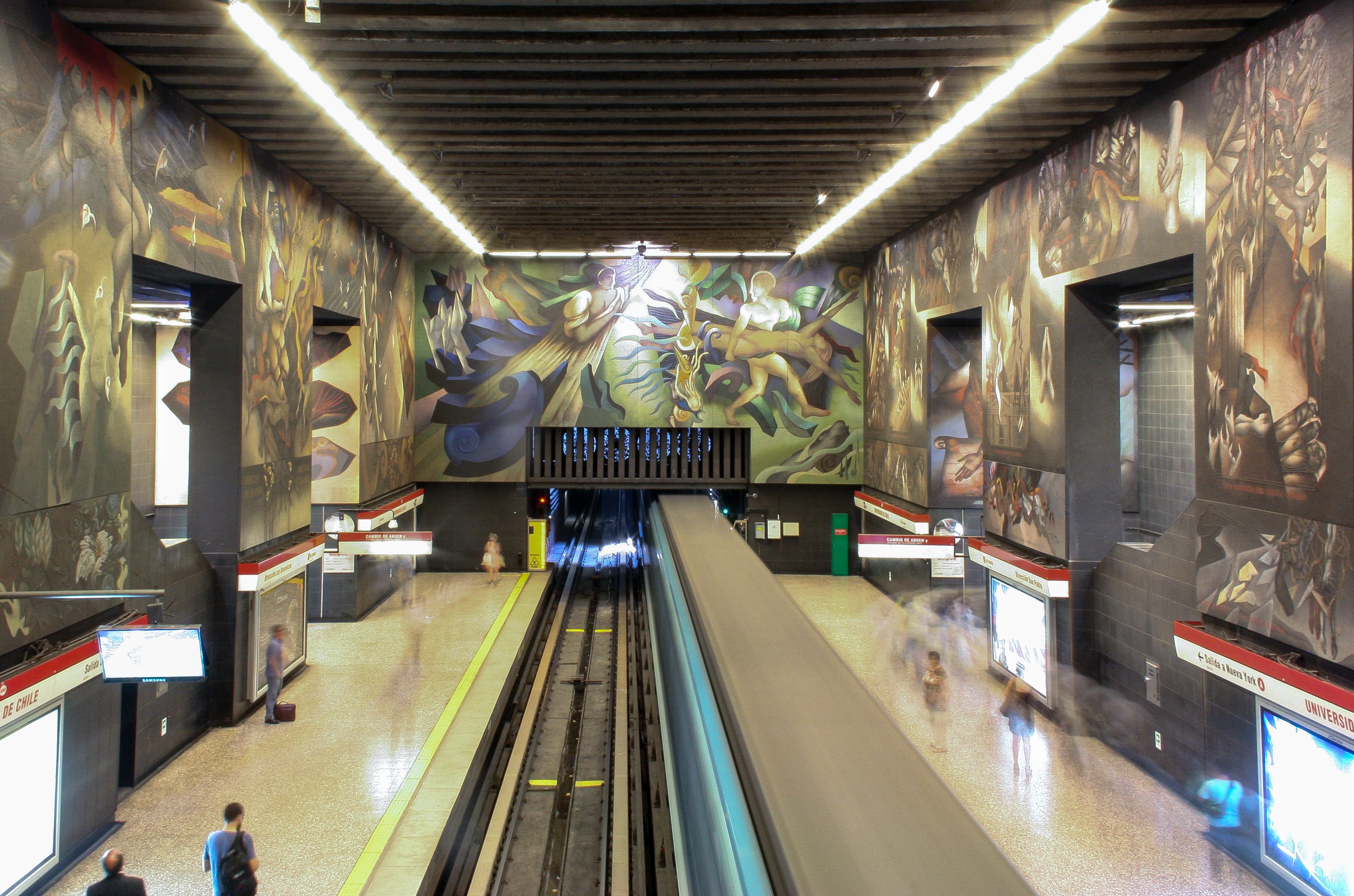 Estacion Universidad de Chile (lineas 1 y 3)